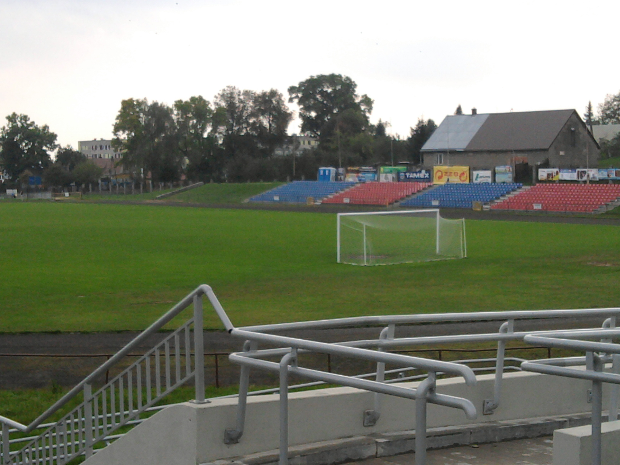 Stadion w Sokółce